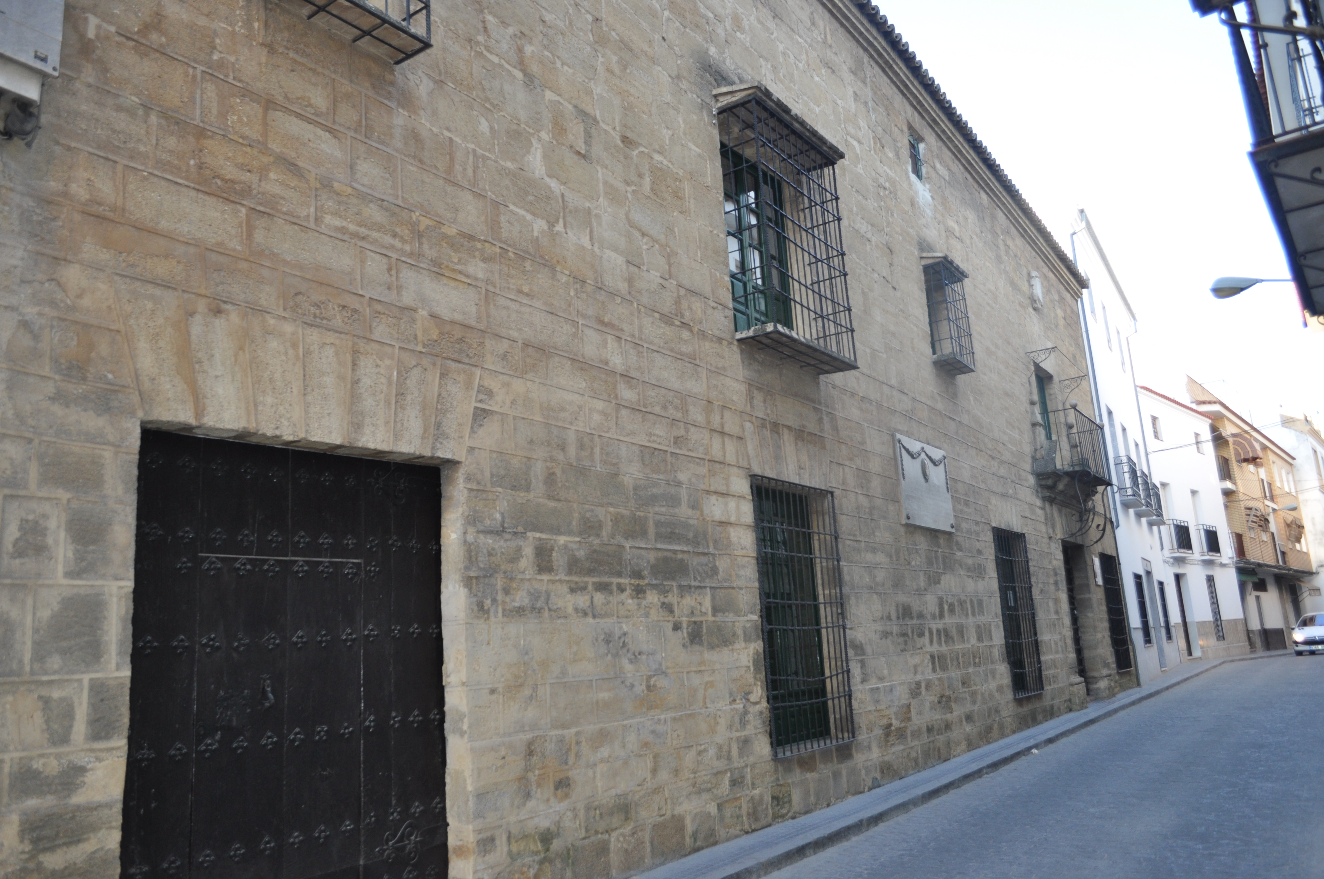 Casa-museo del Inca Garcilaso, el primer autor hispanoamericano en publicar en España, donde vivió más de treinta años.